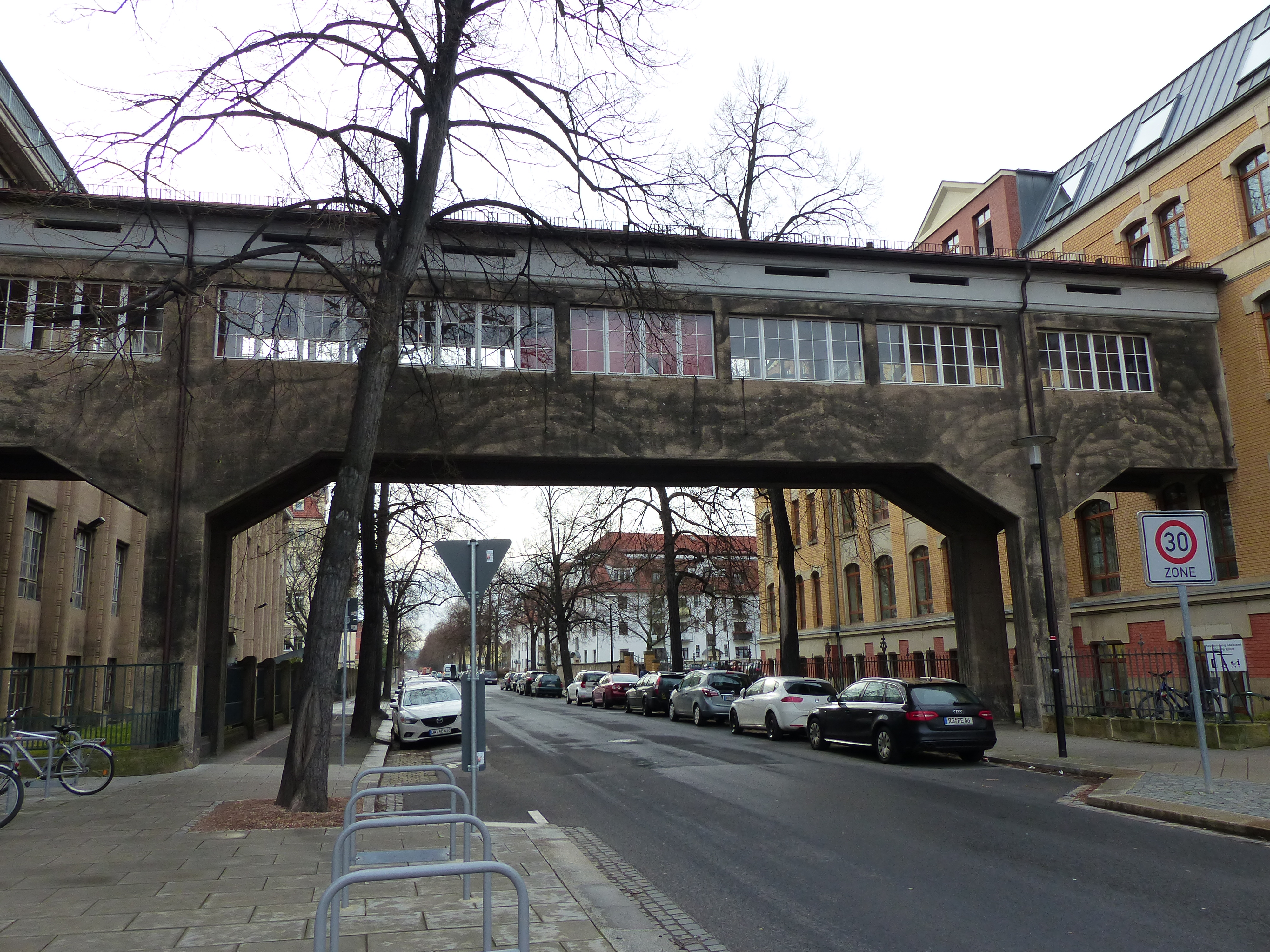 Straßenübergang zwischen den Gebäudeteilen der ehem. Ernemann-Werke in Dresden, heute Technische Sammlungen Dresden, in dem sich hinter den rot verhangenen Fenstern eine Camera obscura befindet